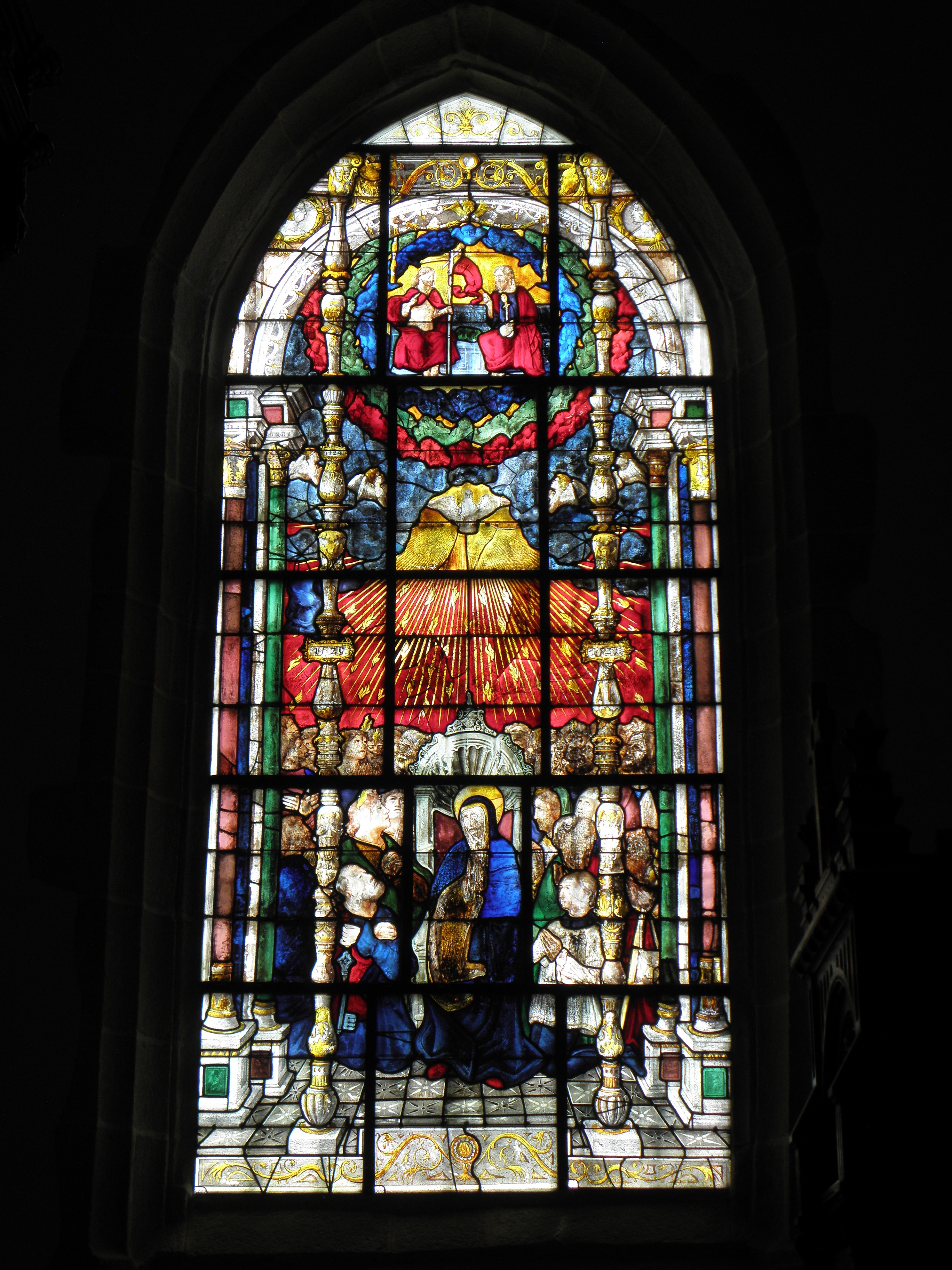 Vitrail de la Pentecôte de la collégiale Sainte-Marie-Madeleine de Champeaux (35).